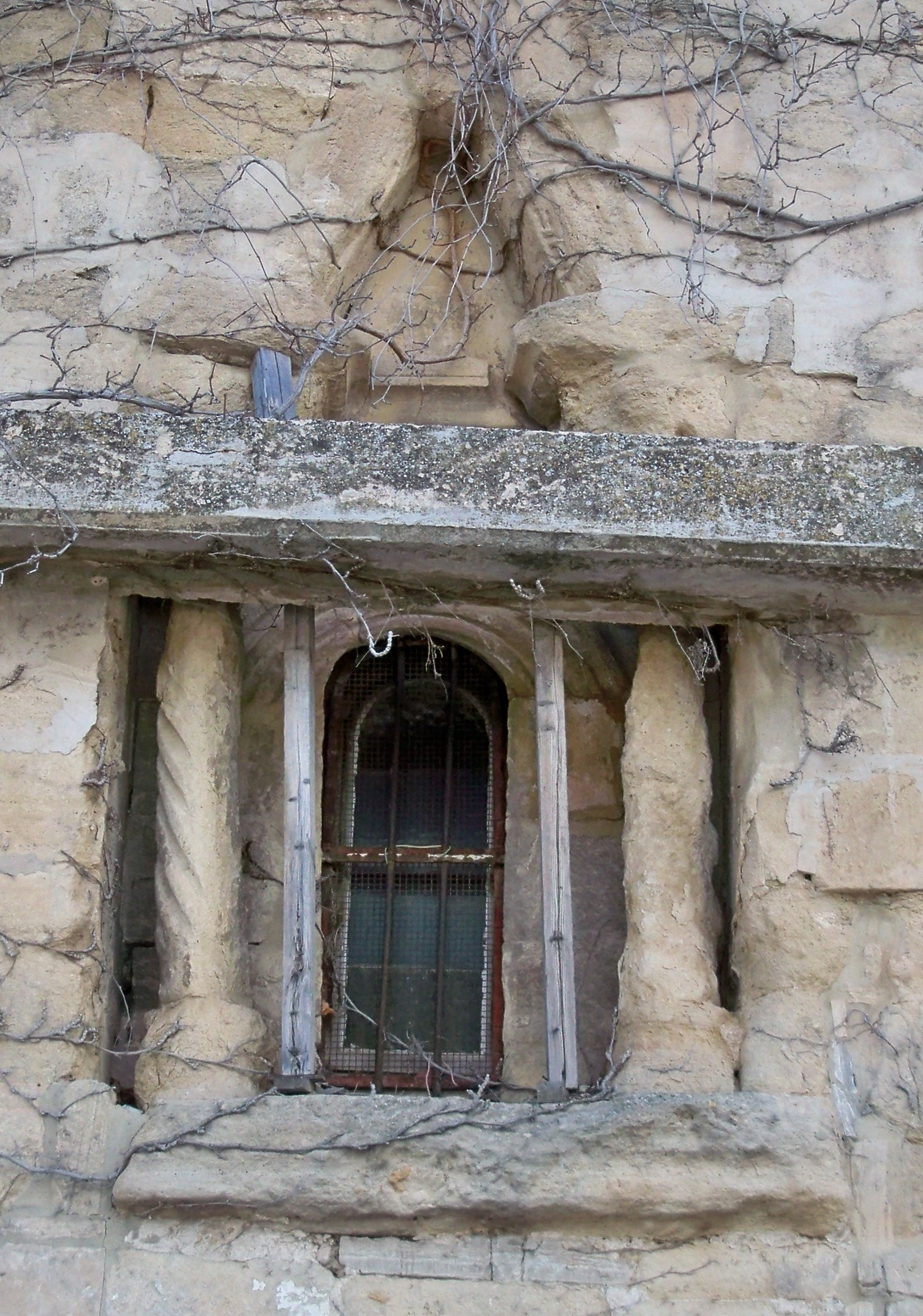 Fenêtre abatiale de église St Laurent, Mormoiron (84)